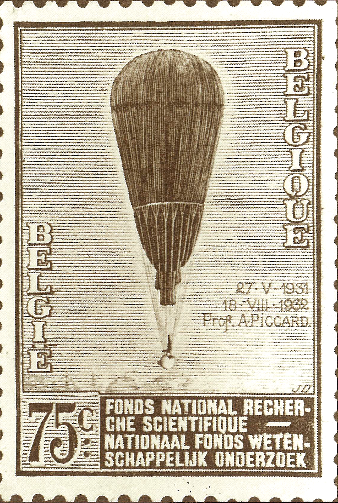 Timbre commémoratif